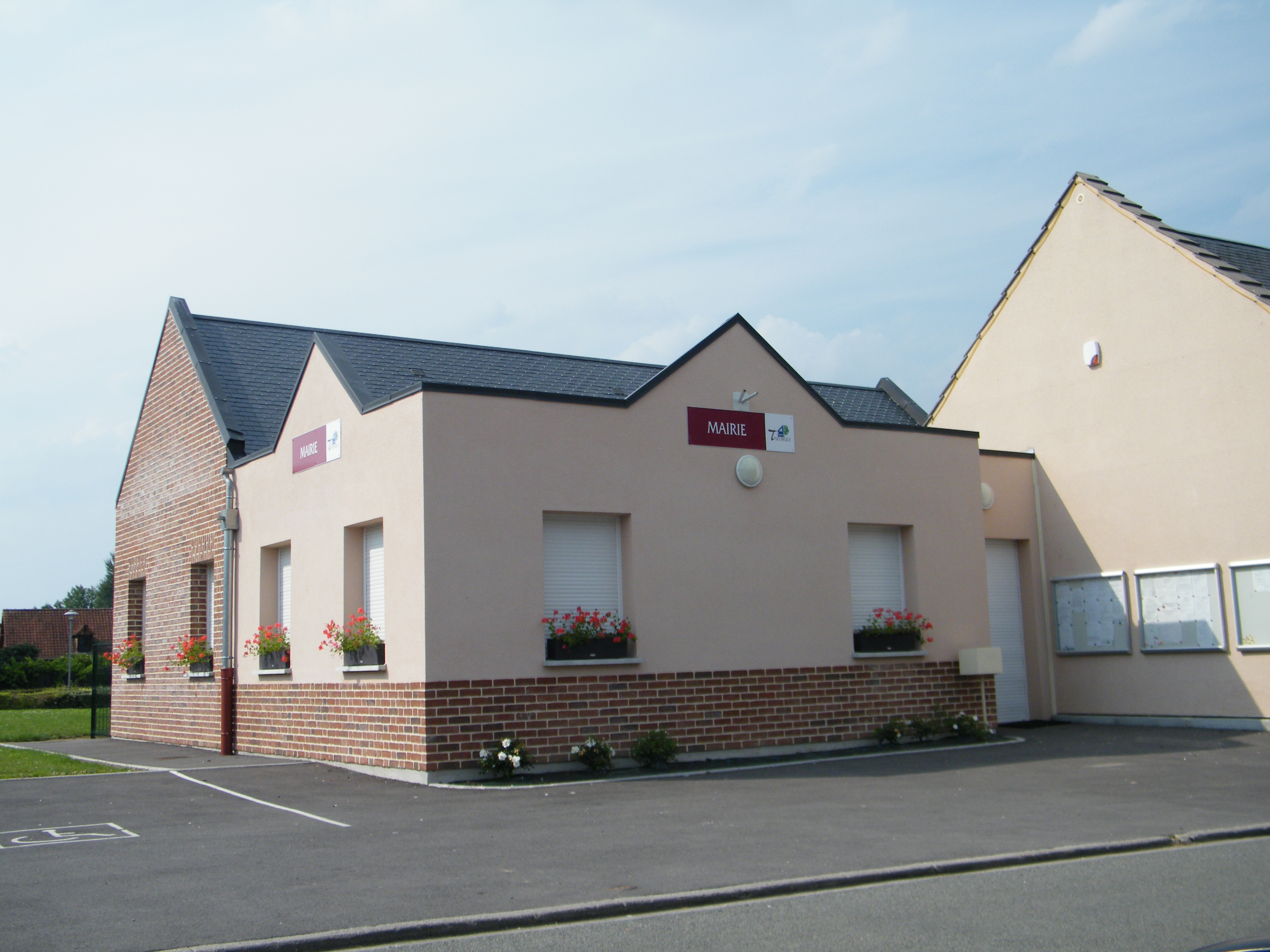 Mairie.